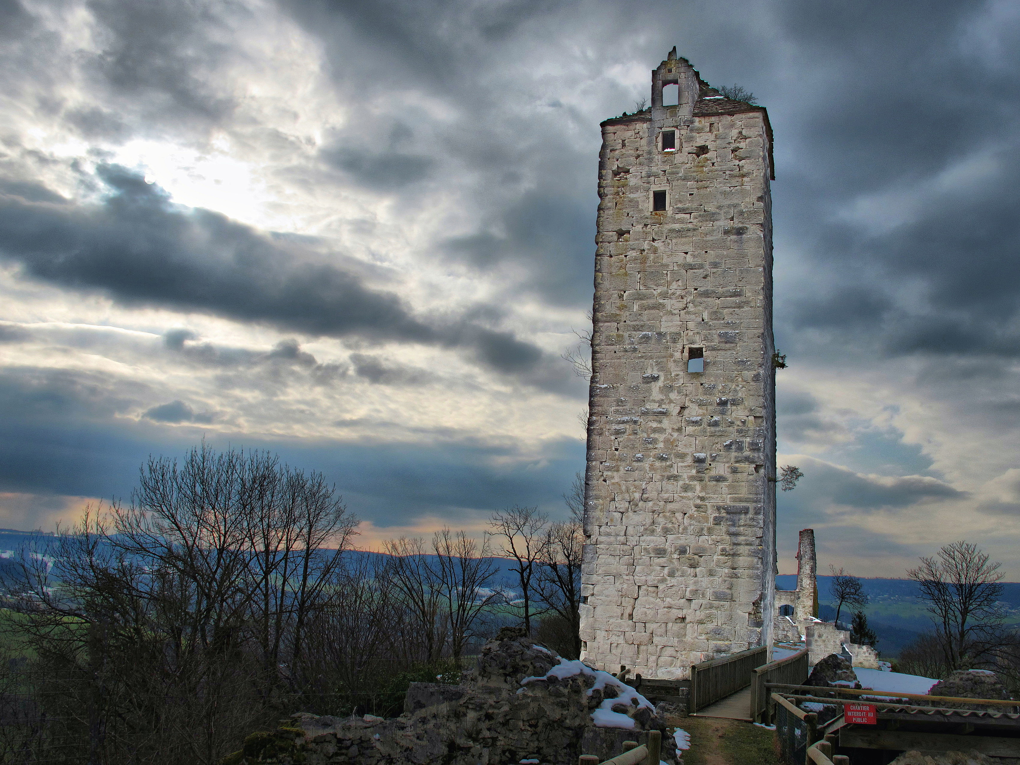 Inscrit aux monuments historiques sous le numéro PA00101623